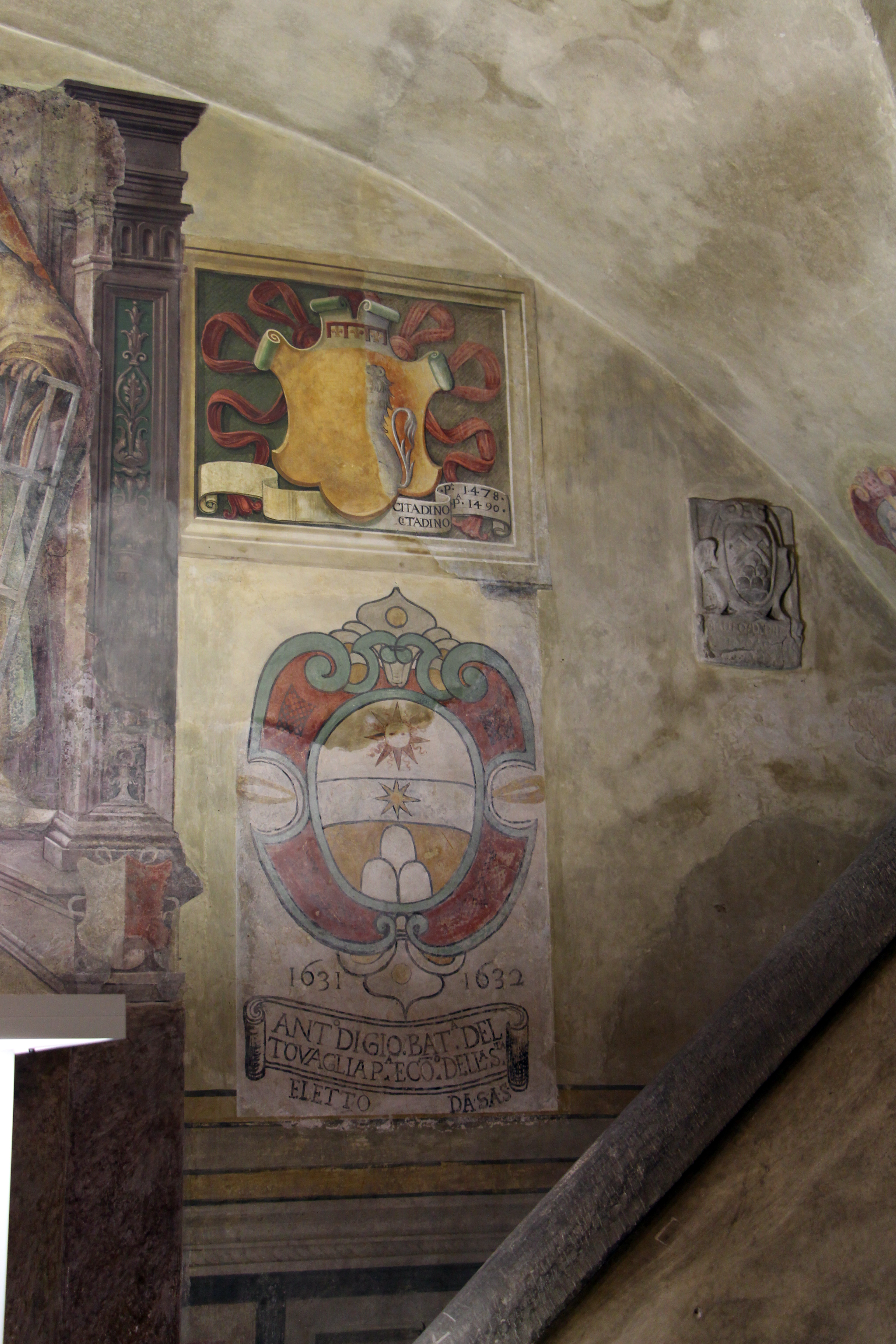 Palazzo del Podestà (Borgo San Lorenzo)